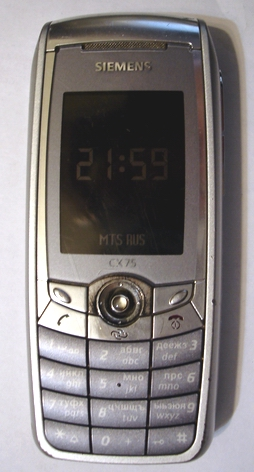 Siemens CX75 mobile phone